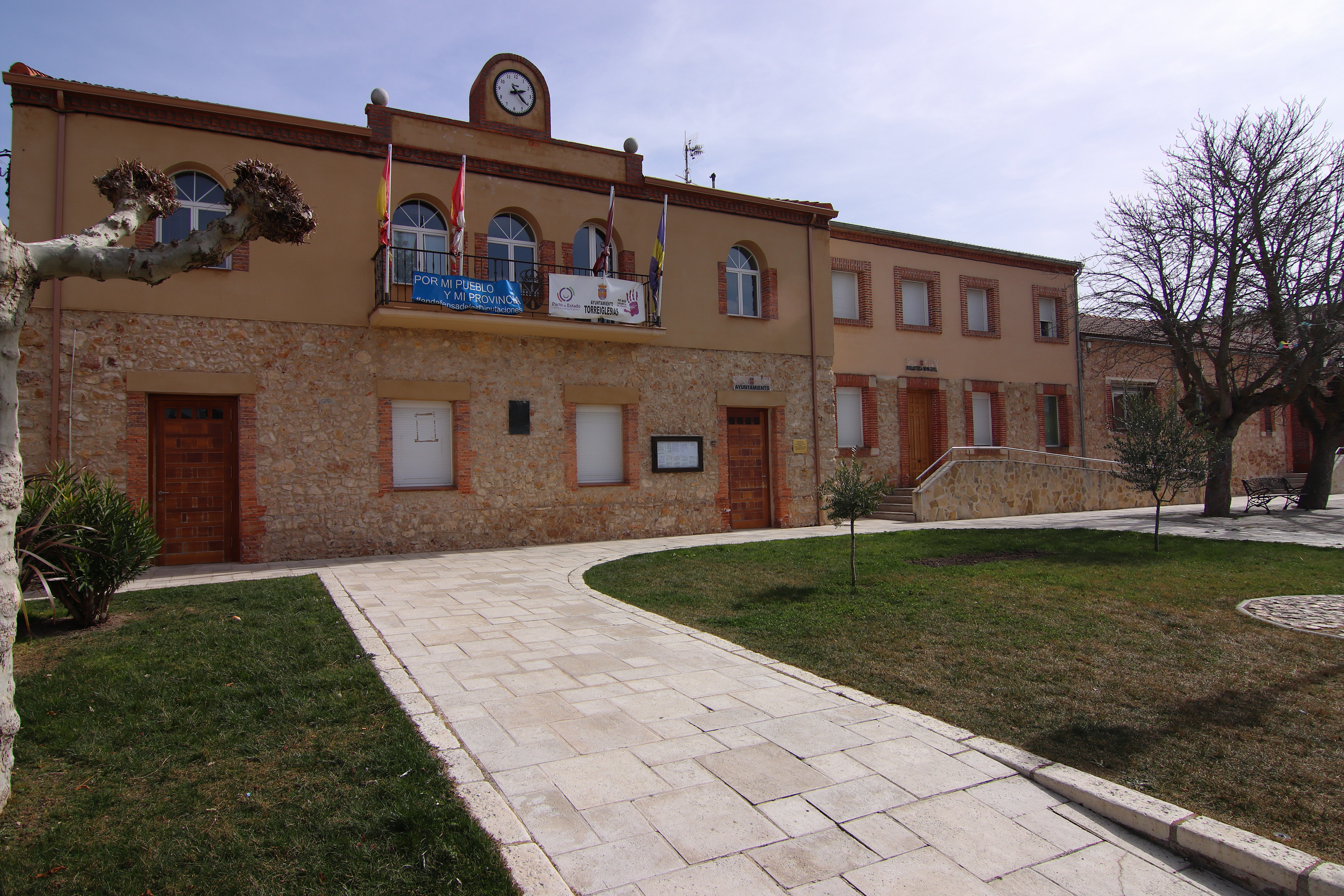 Ayuntamiento,Torreiglesias, 02